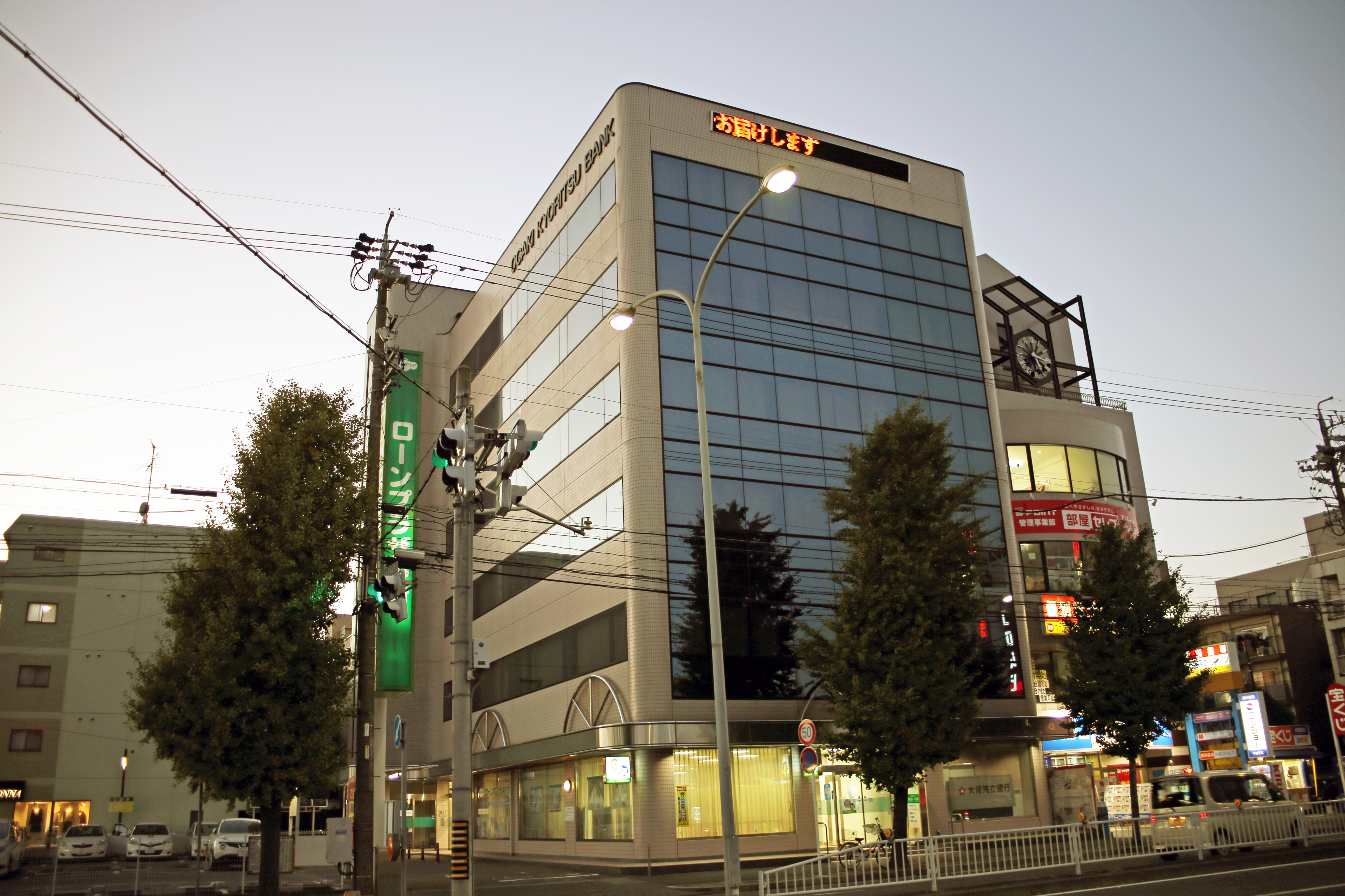 名古屋市中村区豊国通一丁目の大垣共立銀行中村支店ビルを東側公道南側より撮影。ただし、Photoshop Elementsにより画像補正。